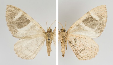 Hagnagora subrosea